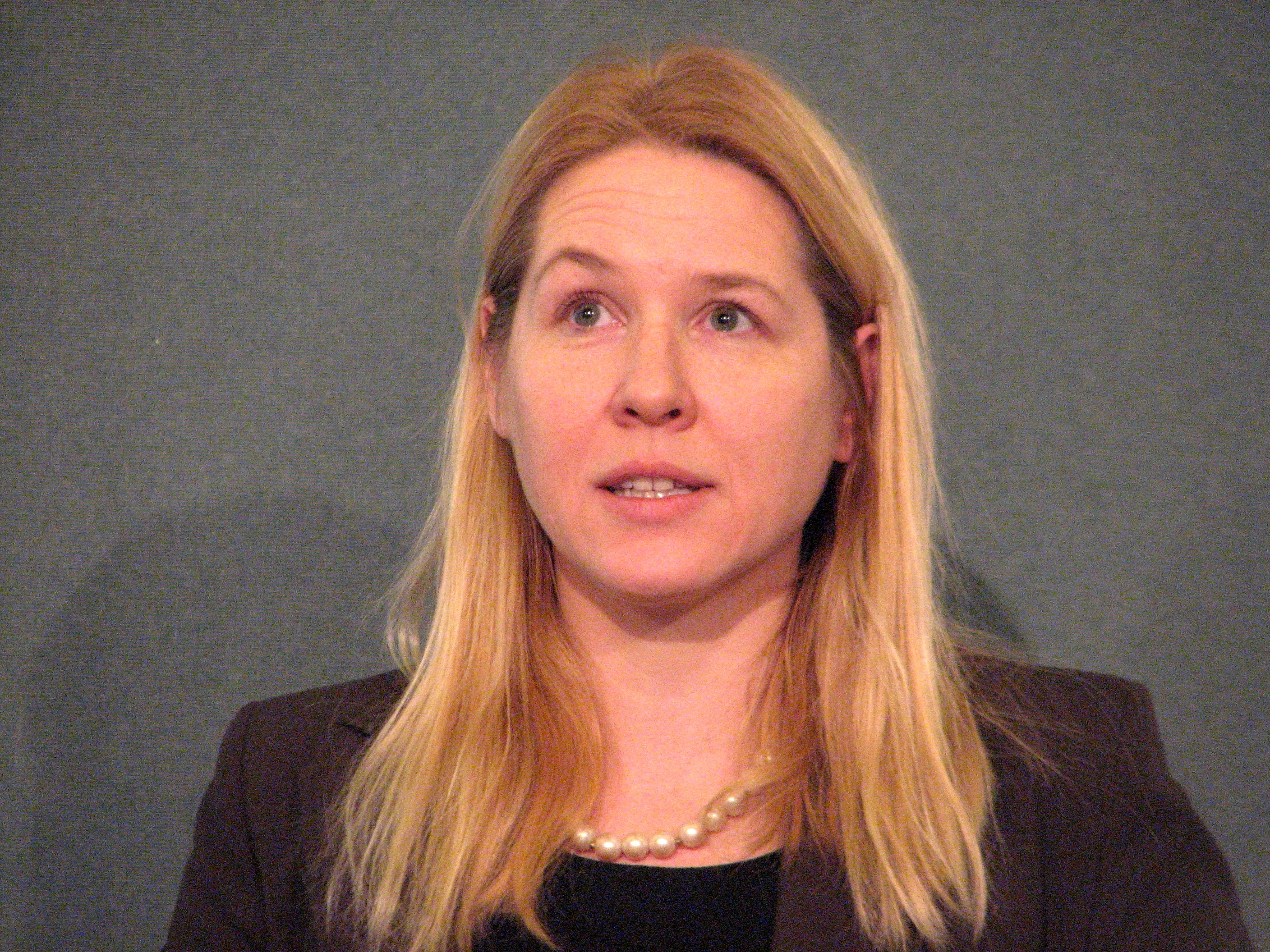 Maarja Vaino esinemas A. H. Tammsaare Muuseumi 9. sügiskonverentsil